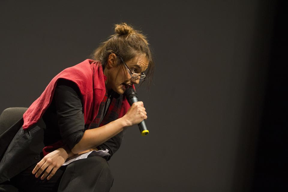 A Budapesti Katona József Színház, "Katona 30" című gálaesten készült felvétel. Pálmai Anna, Ascher Tamás paródiája